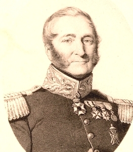 W.G. van Nahuys van Burgst